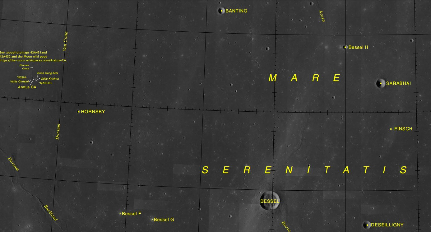 Cráter lunar Hornsby. Localización. (Imagen LRO)